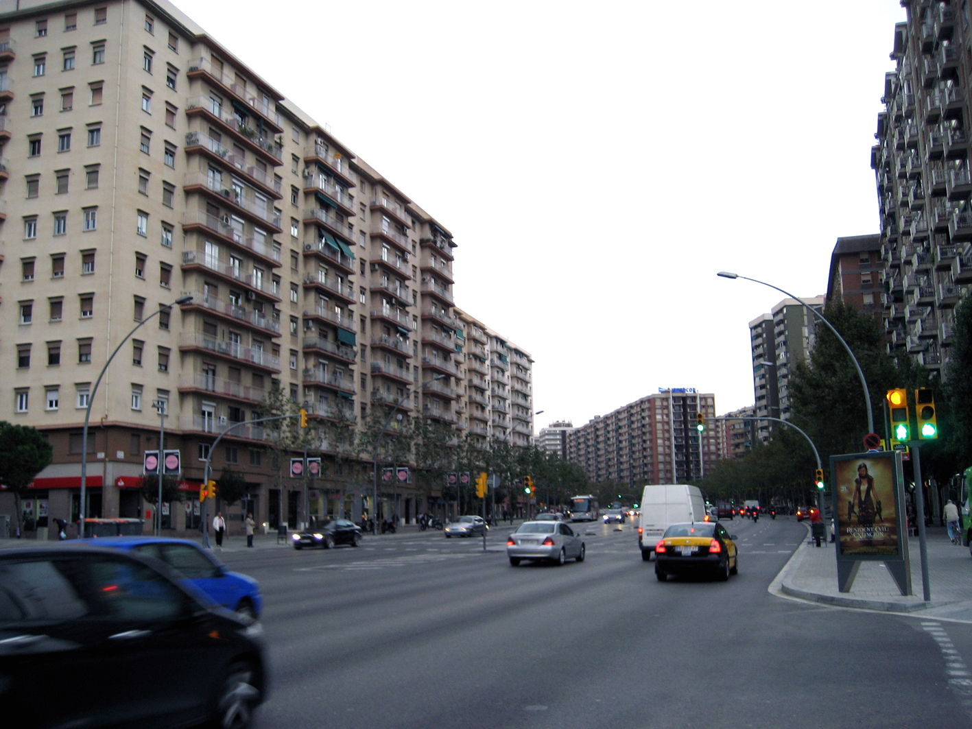 Avenida Meeridiana en Barcelona. Cataluña. España